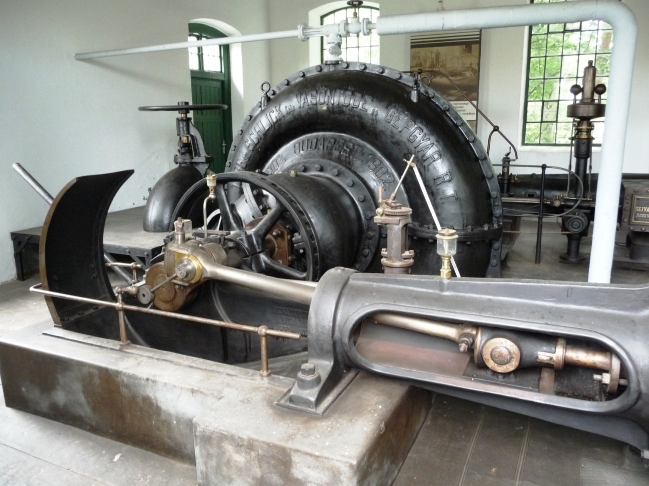 A peresi szivattyútelep 1902-ben készült gőzgépe (Mezőtúr)